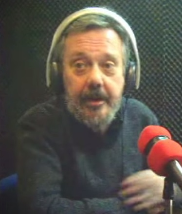 Moncho Alpuente en Barrio Canino.